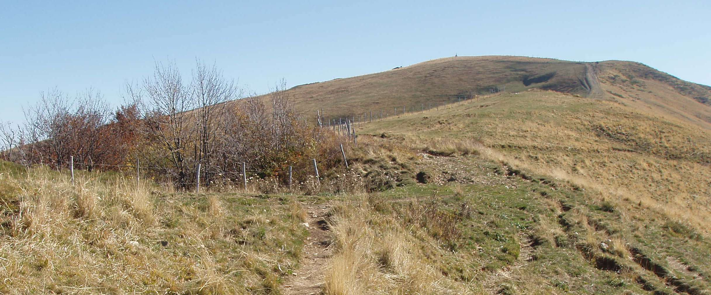 Il Monte Chiappo dal Coserone